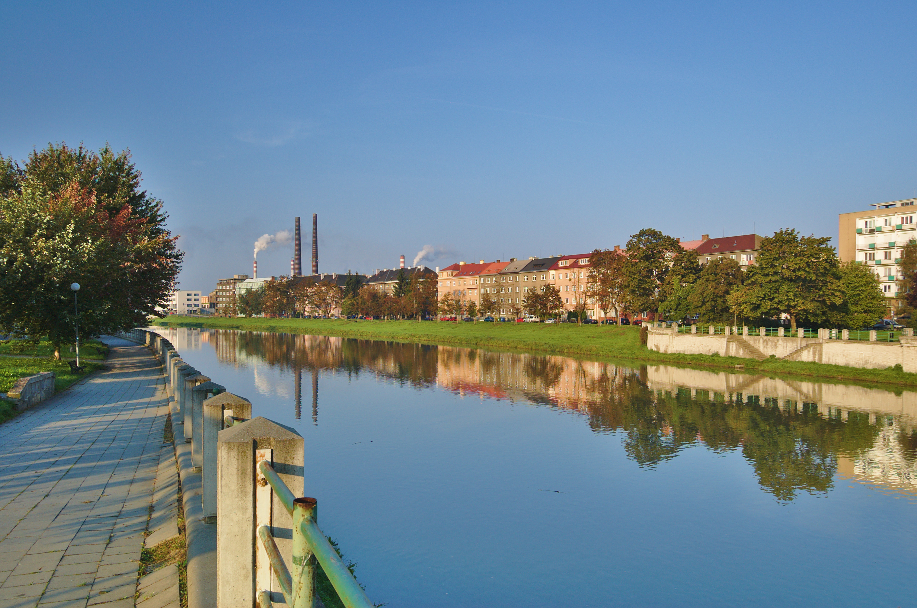 Přerov po proudu Bečvy z mostu Míru